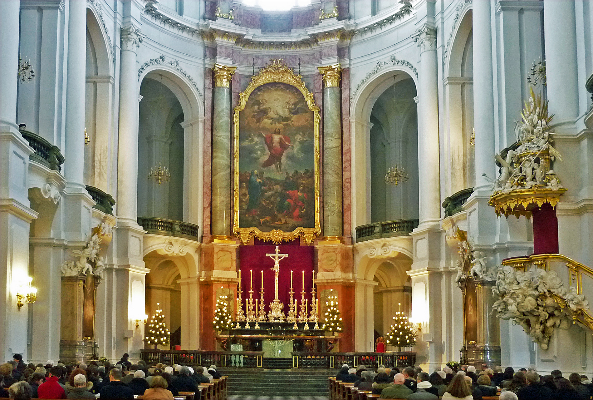 Weihnachten in der Hofkirche in Dresden